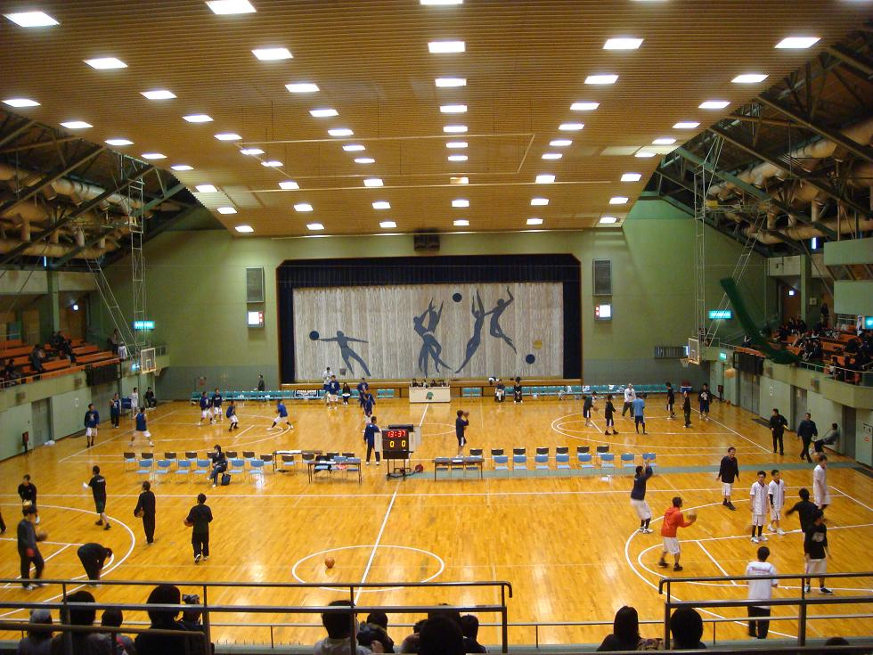 徳島市立体育館（四国総合バスケットボール選手権大会開催時）